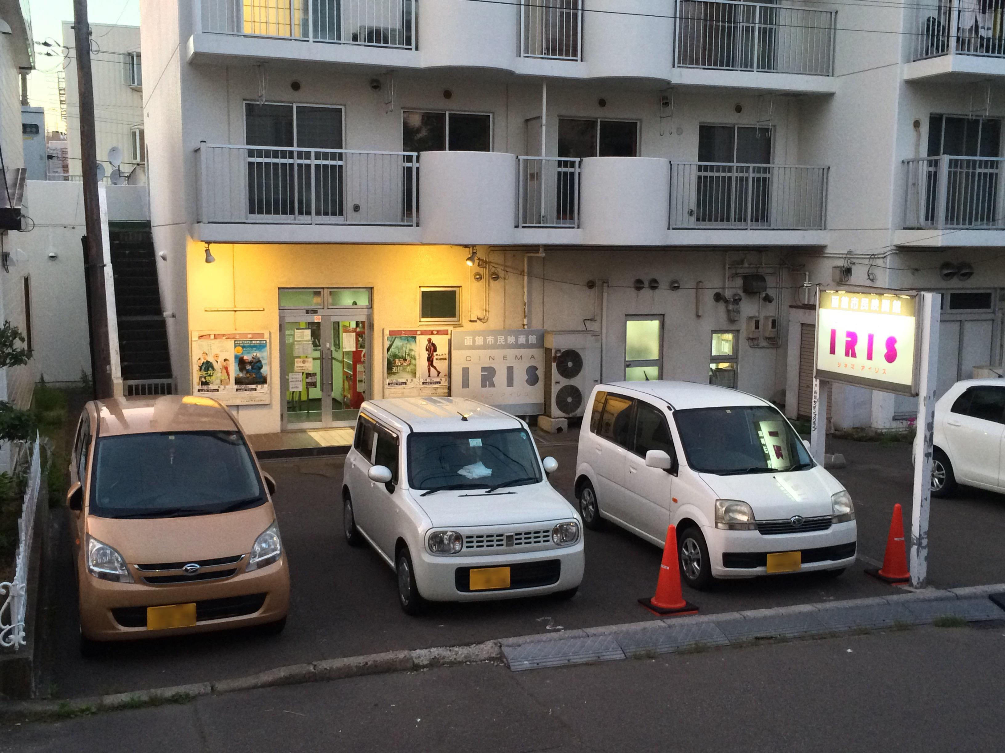 シネマアイリスの外観、2016-06-29撮影